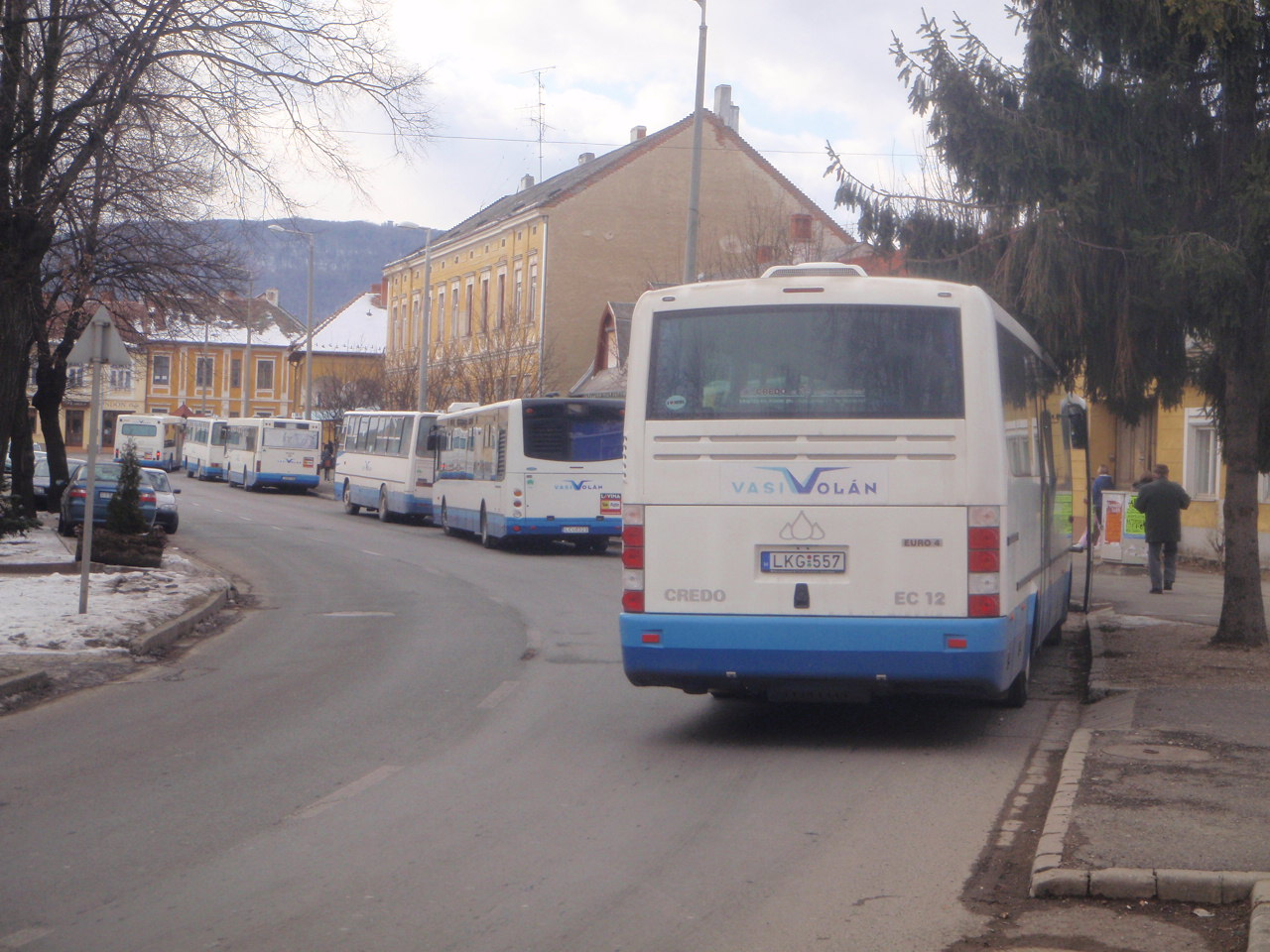 Bushaltenstelle Güns, Liszt Strasse